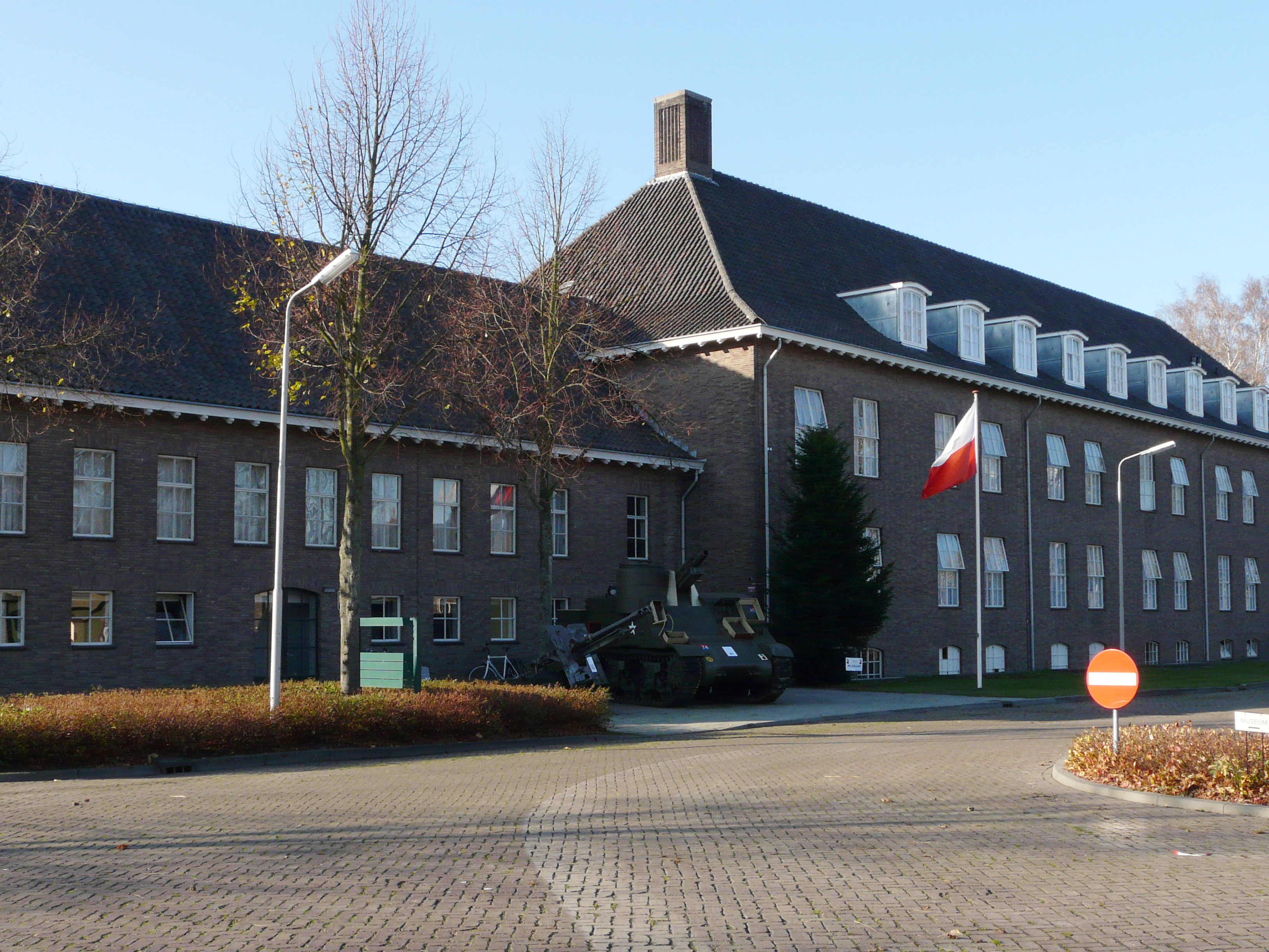 Zicht op een deel van de voorkant van het voormalige Generaal Maczek Museum. Het was gevestigd in gebouw R op de Trip van Zoudtlandtkazerne, De la Reijweg 95, 4818 BA Breda